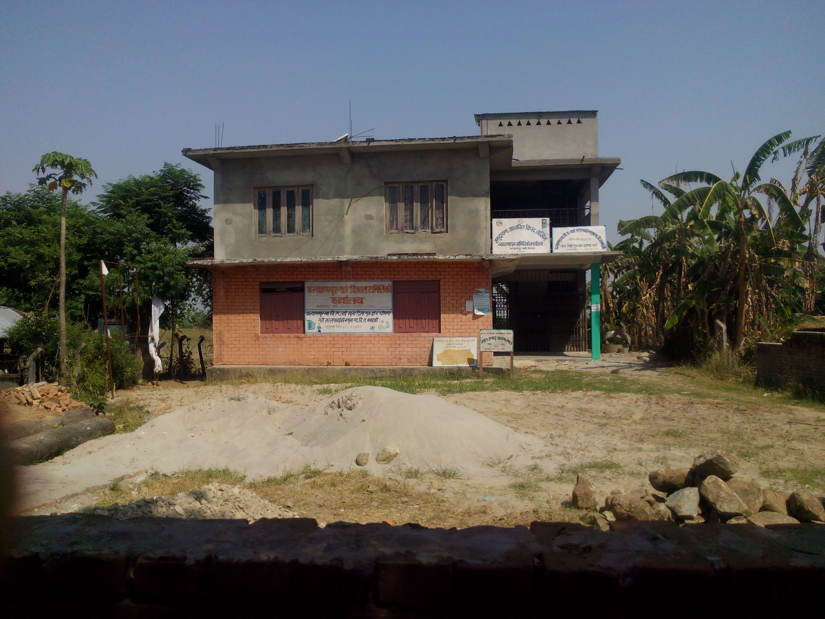 माडी कल्याणपुर स्थित गा बि स को कार्यलय